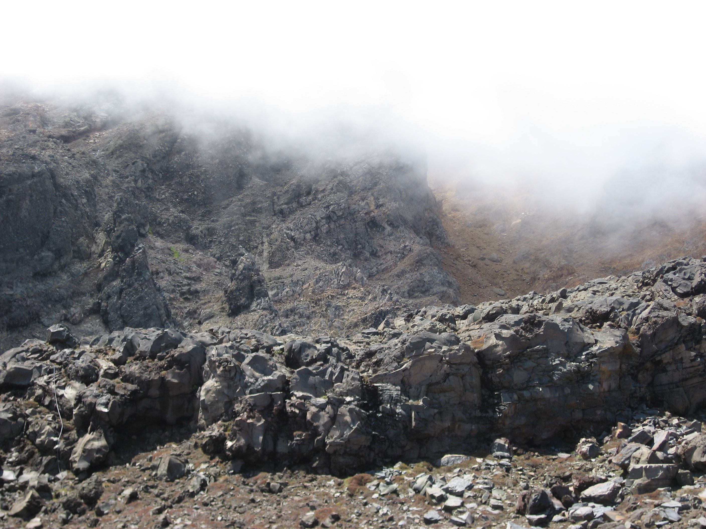 Tongariro National Park en Nueva Zelanda. Escenario de Mordor en la pelicula de El Señor de los Anillos